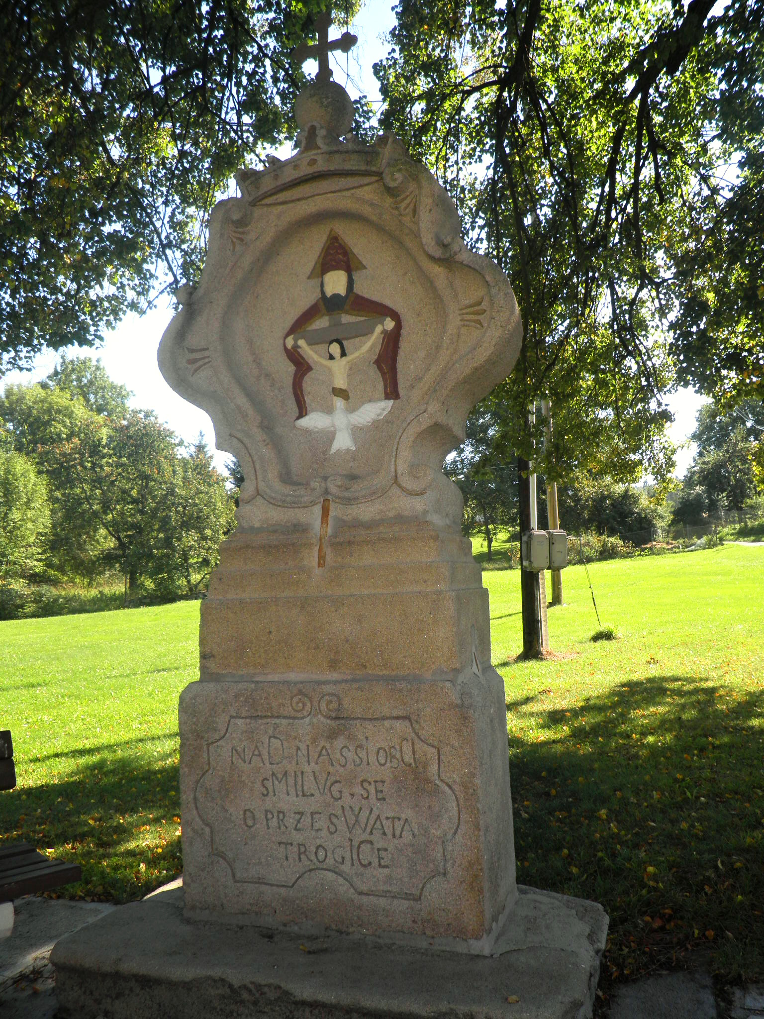 Boží muka, náves, Dobrkovská Lhotka